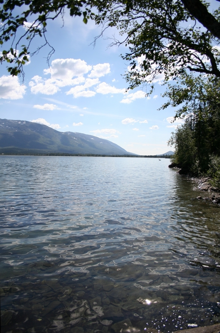 Nedre Fiplingvatn mot Sør